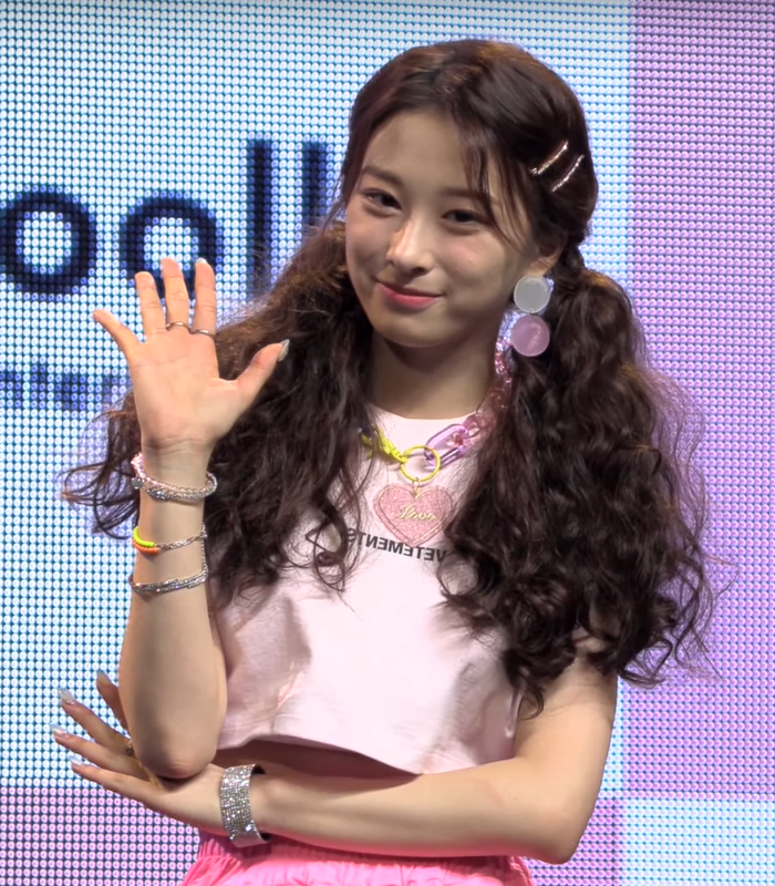 2019 Rocket Punch 1st Album Pink Punch Showcase Yun Kyoung